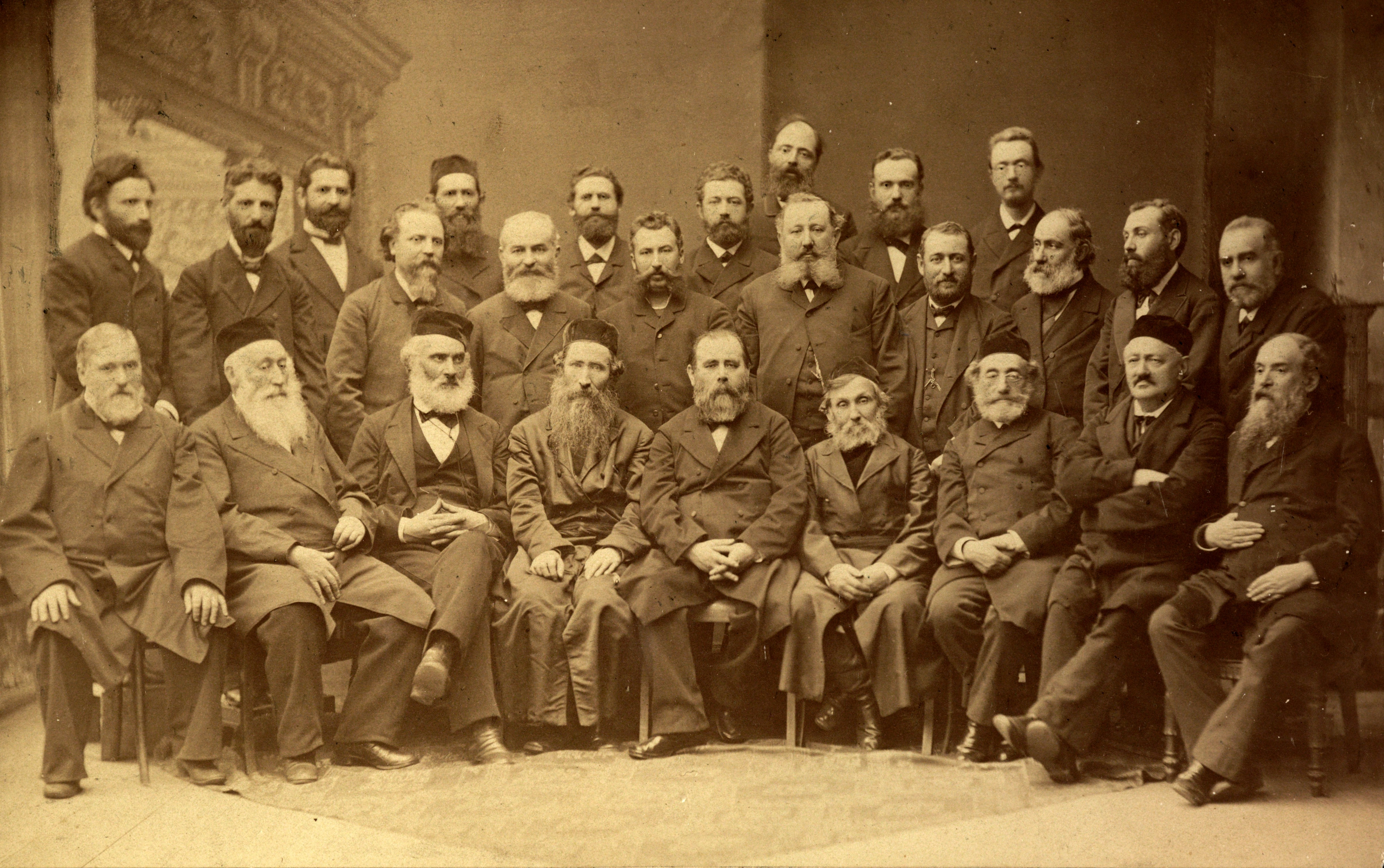 תצלום קבוצתי שבו נראים משתתפי ועידת קאטוביץ', הוועידה הראשונה של חובבי ציון, שהתכנסה ביום 6 בנובמבר 1884 (י"ח בחשוון תרמ"ה): הדפס חלבון מודבק על גבי לוח-מסגרת מקרטון מעוטר, בגודל 26X35.5 ס"מ. יושבים, מימין לשמאל: יעקב דייכס; ישראל מיכל רבינוביץ; אלכסנדר צדרבוים (אר"ז); דוד פרידמן; יהודה לייב פינסקר; שמואל מוהליבר; דוד גורדון; לייב קליבנסקי; קלונימוס זאב ויסוצקי. בין העומדים מאחור נראים, בין היתר, יוסף חזנוביץ ושאול פנחס רבינוביץ (שפ"ר). על מסגרת התצלום כתב ד"ר יוסף חזנוביץ בעברית, בדיו, את כותרתו. בפינה הימנית של המסגרת נדפס מקום הצילום ובפינה השמאלית שם הצלם: P. Krause. בגב הלוח הוטבעה חותמת "גנזי יוסף בירושלם" המעידה כי התצלום נתרם לספרייה הלאומית על ידי ד"ר יוסף חזנוביץ', ביאליסטוק, בסוף המאה התשע עשרה או בראשית המאה העשרים.